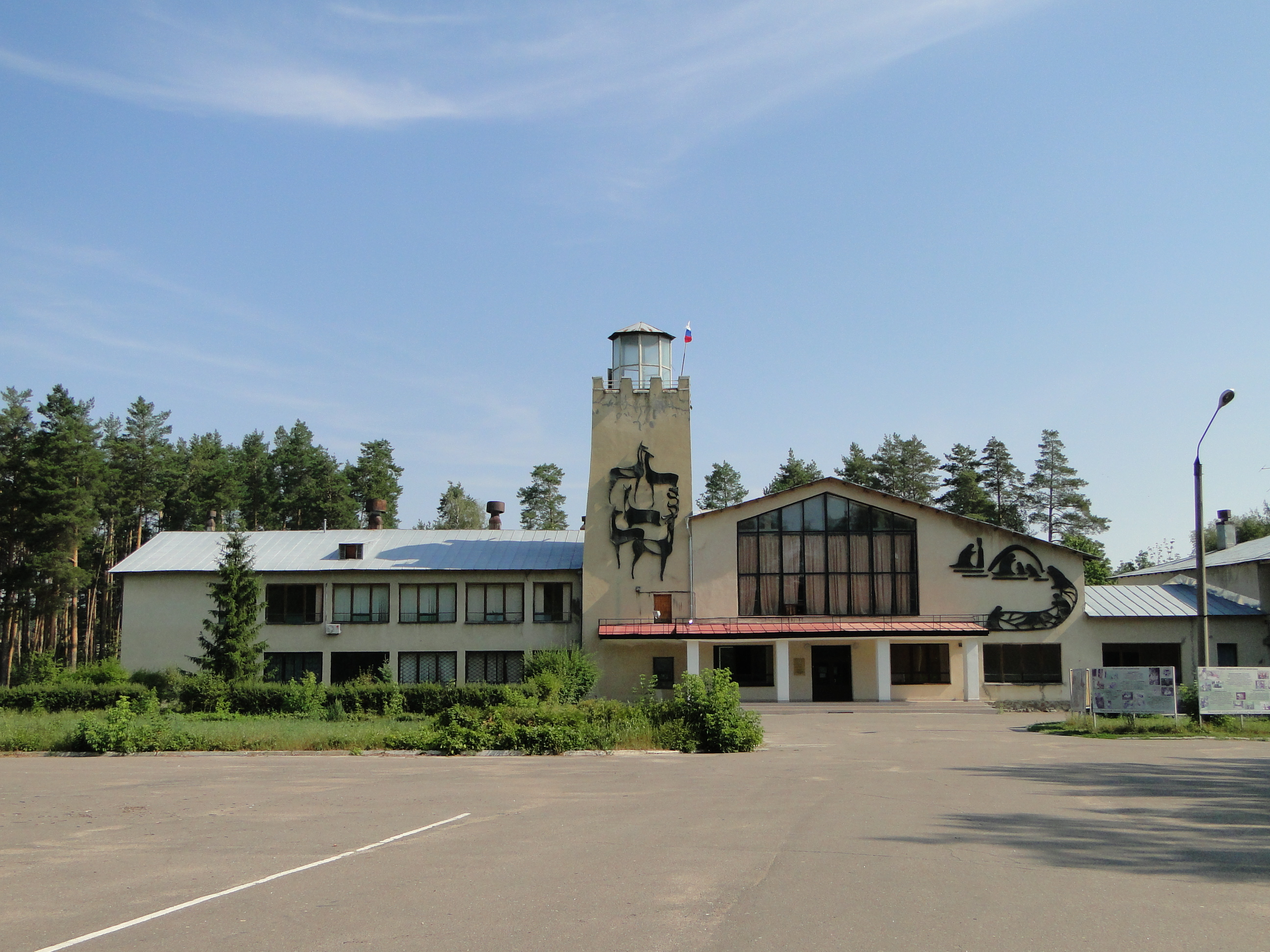 Воронежский биосферный заповедник. Здание музея